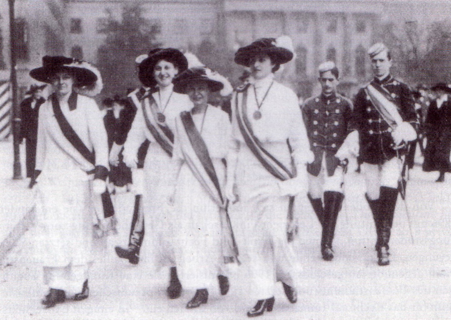 Fotografie von korporierten Studentinnen und Studenten in Berlin